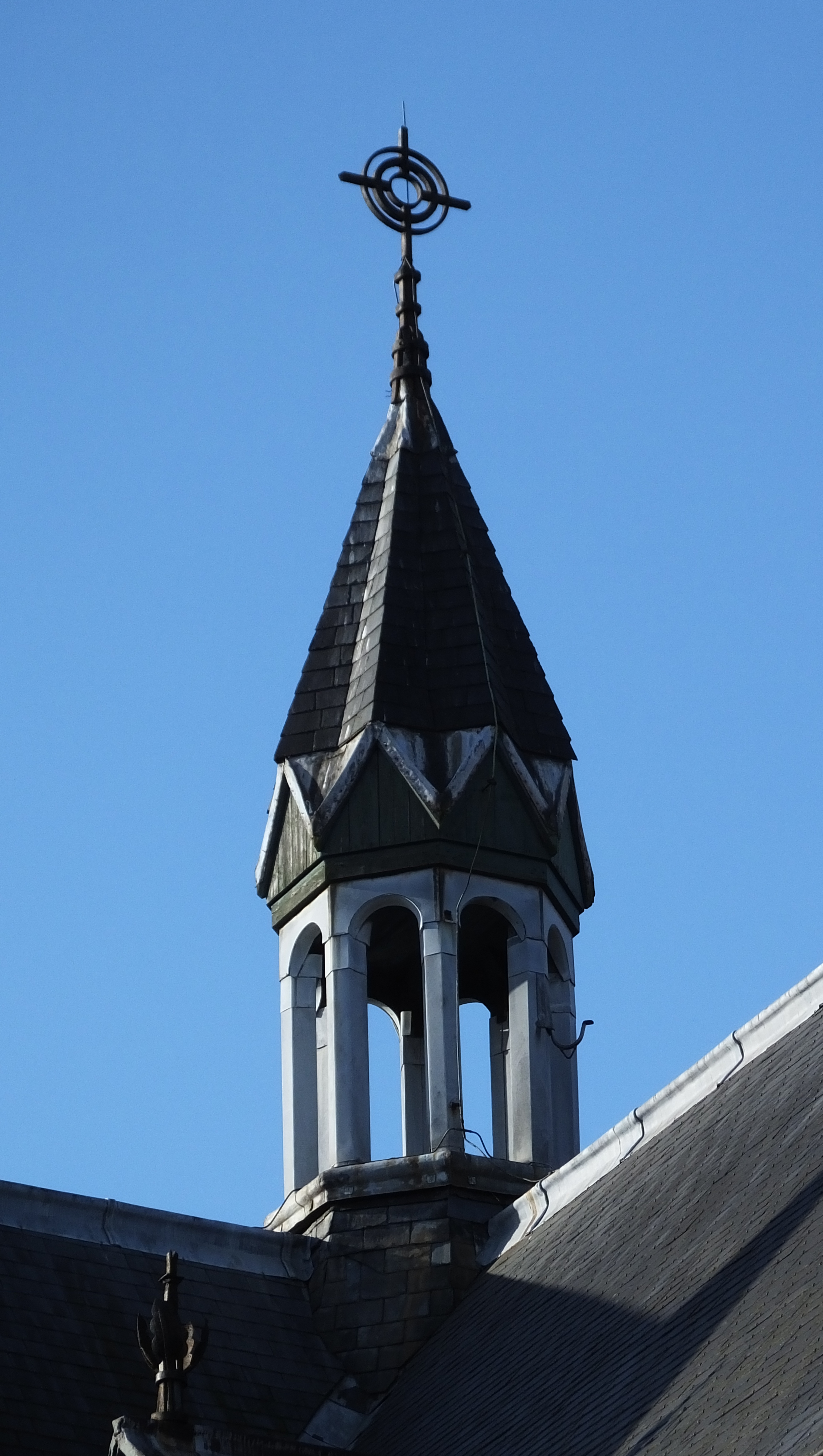 Kosciół św. Urbana w Duivendrechcie pod Amsterdamem